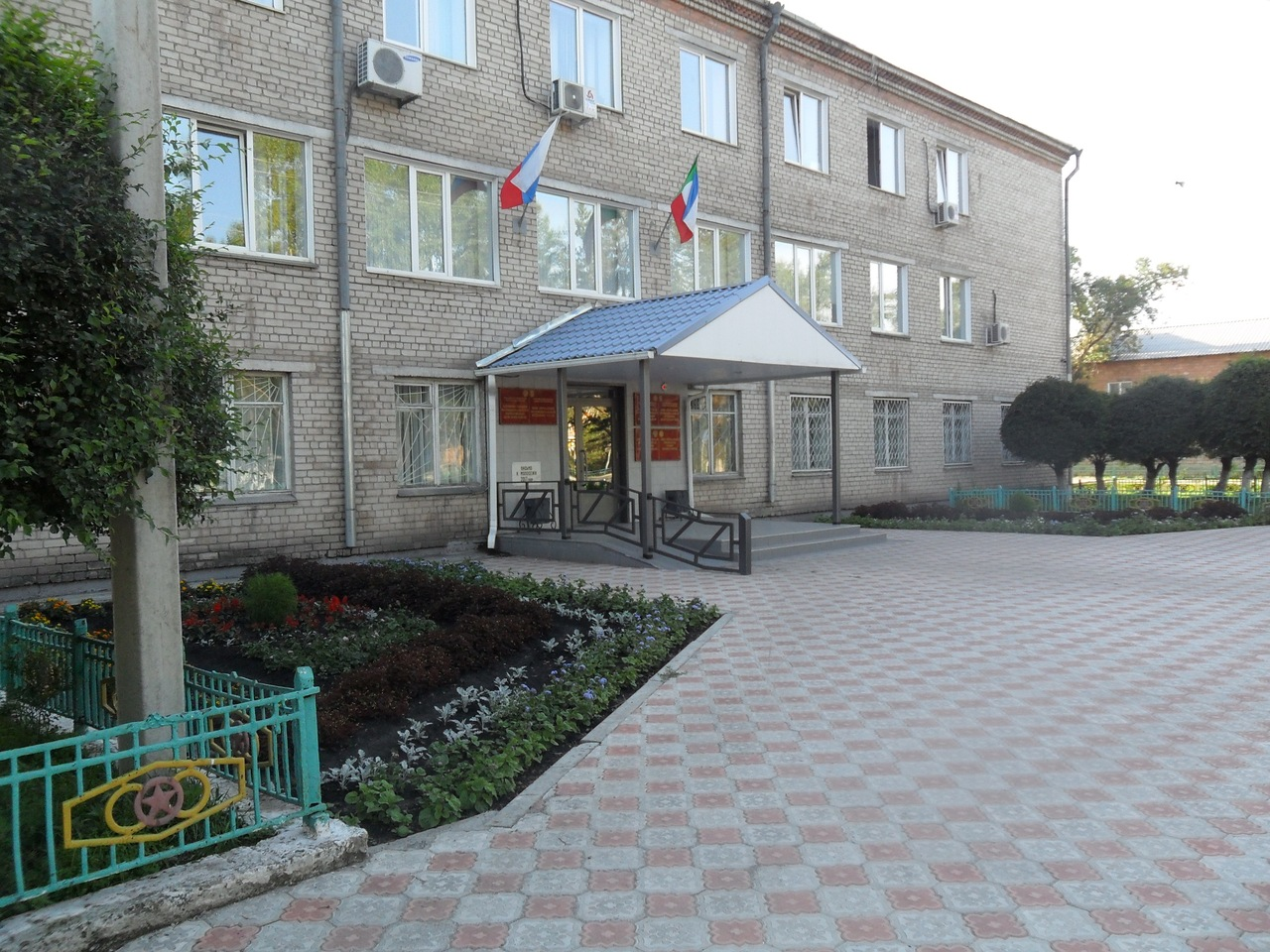 Администрация Бейского района.